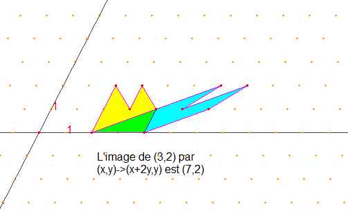 créé sous cabri